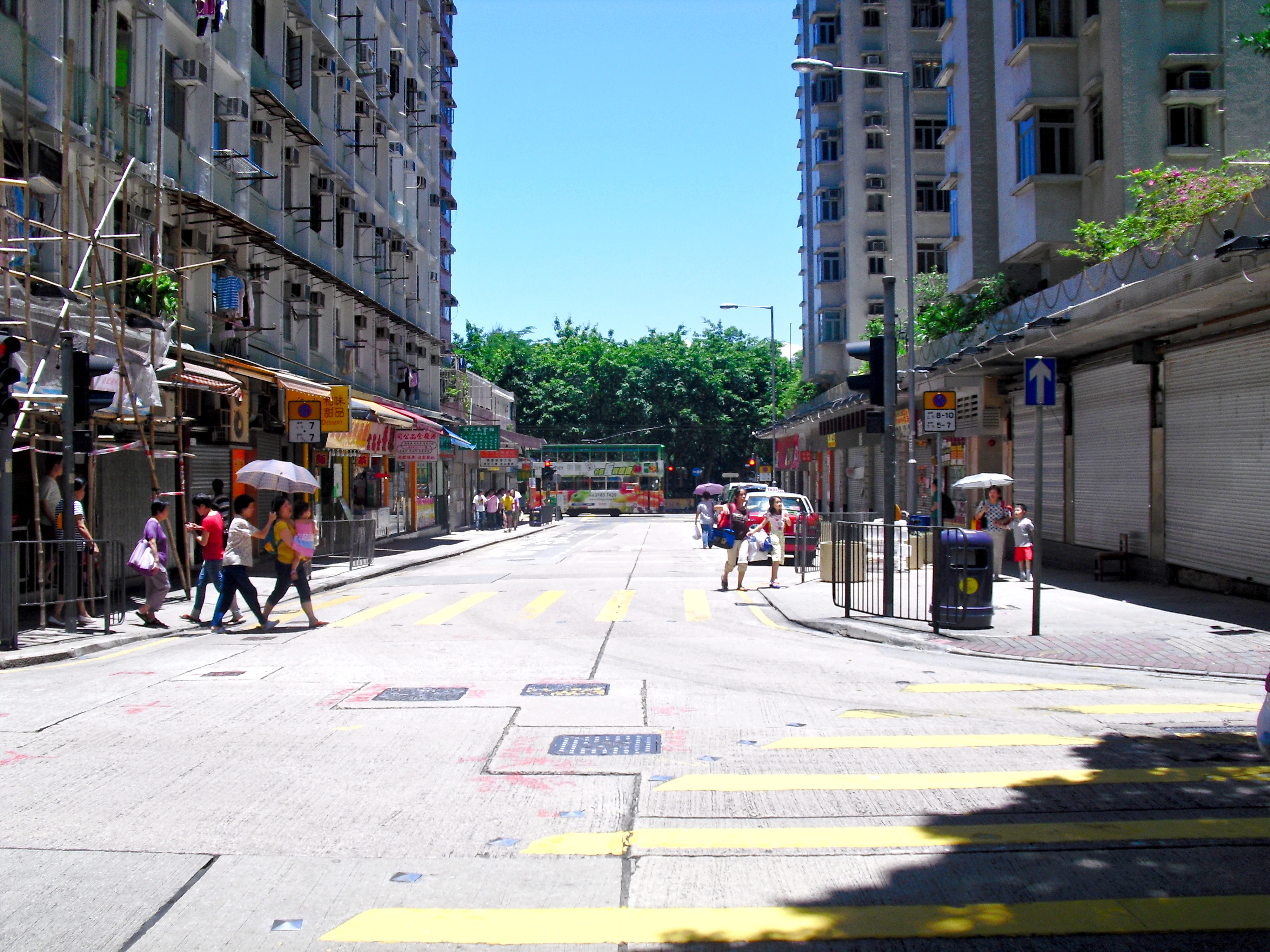 荷蘭街